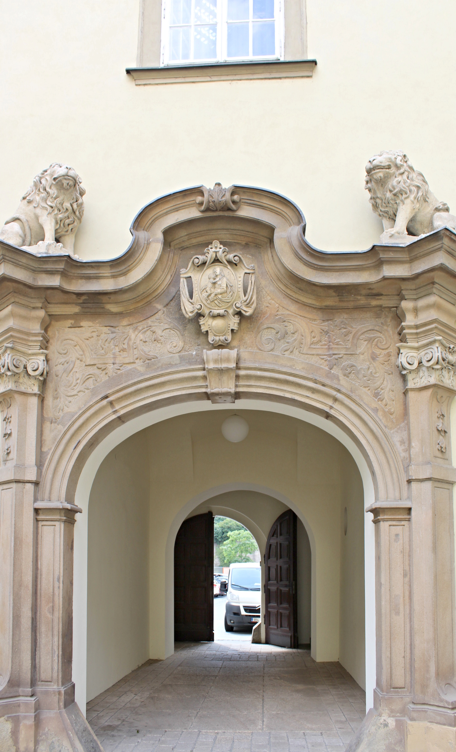 Nová radnice v Brně